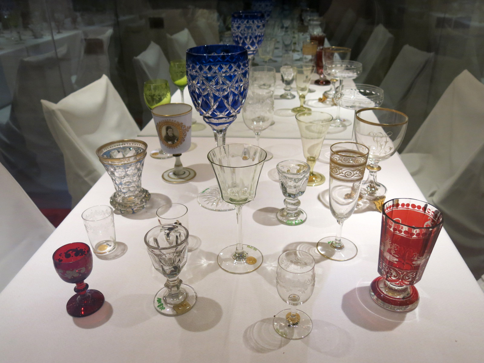 Palau Reial de Vilafranca del Penedès. Acull el museu VINSEUM, Museu de les Cultures del Vi de Catalunya)